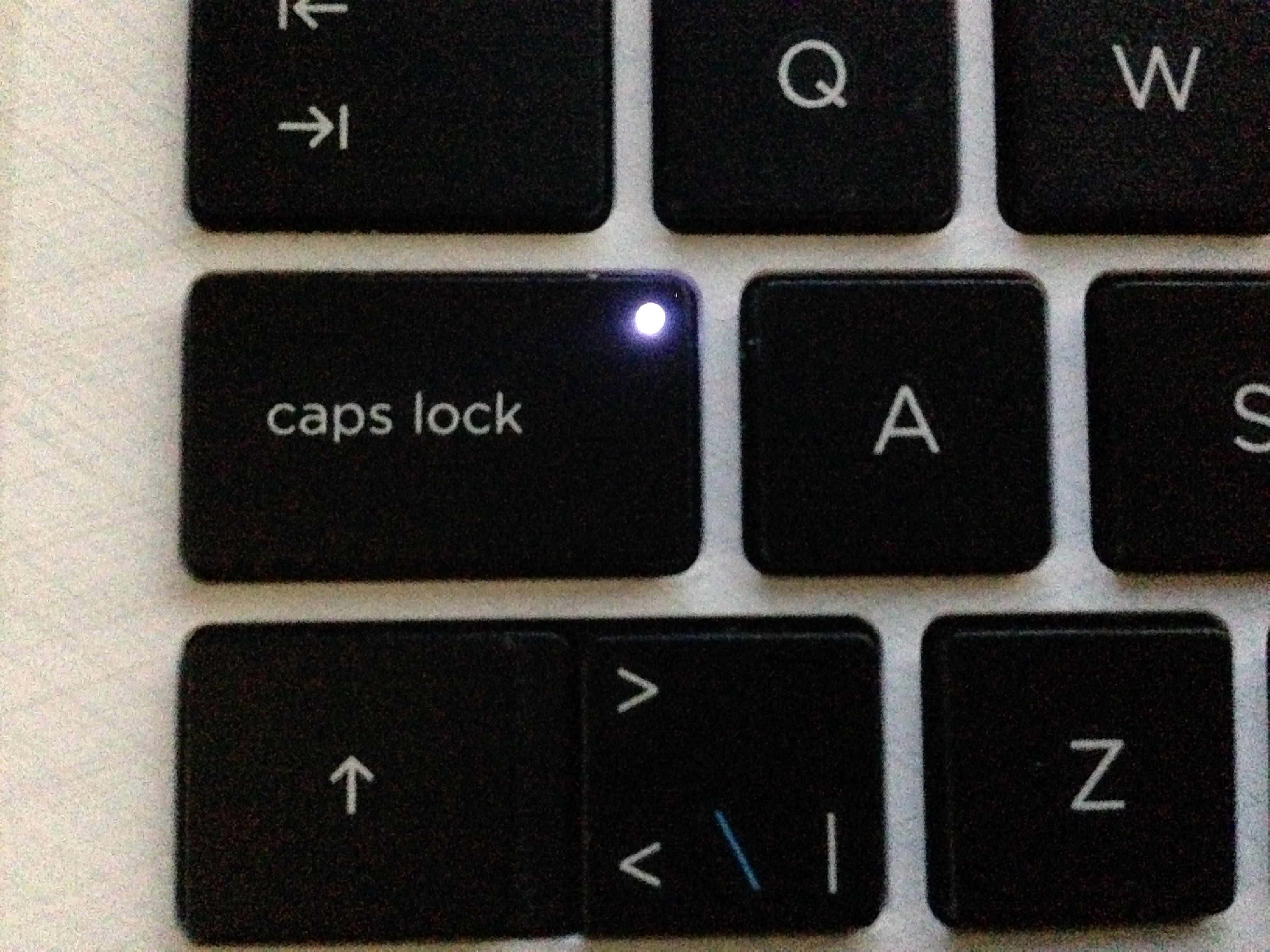 Caps Lock valolla